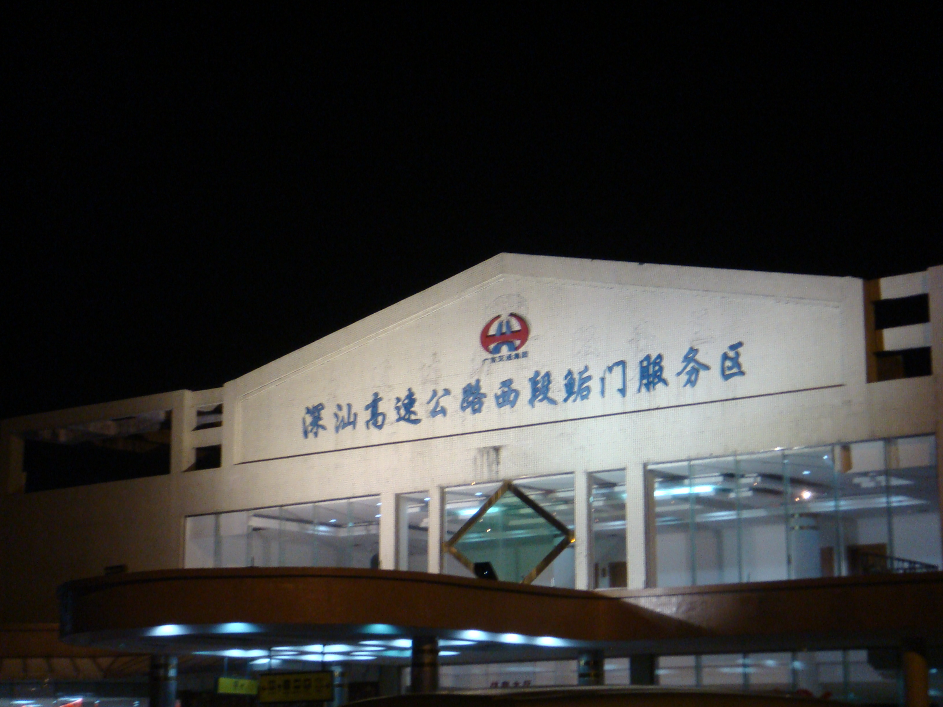 鮜門服務區